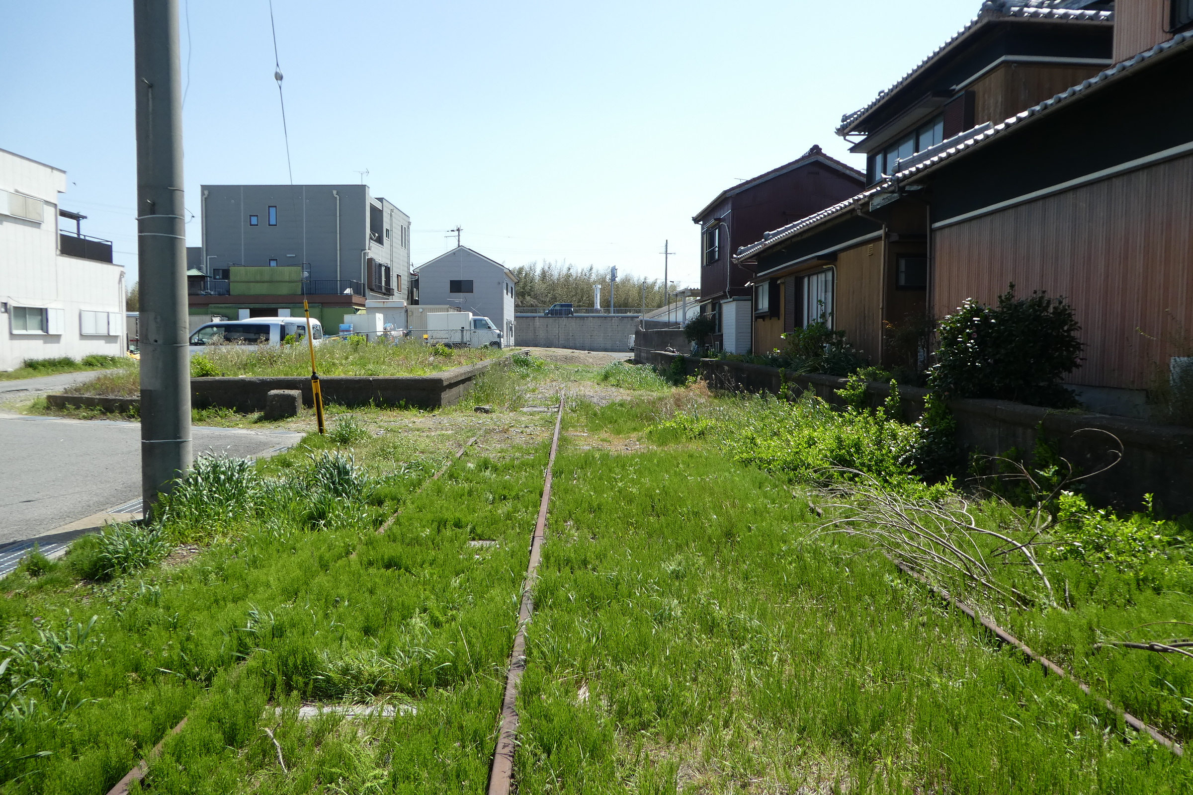 紀州鉄道紀州鉄道線日高川駅跡。